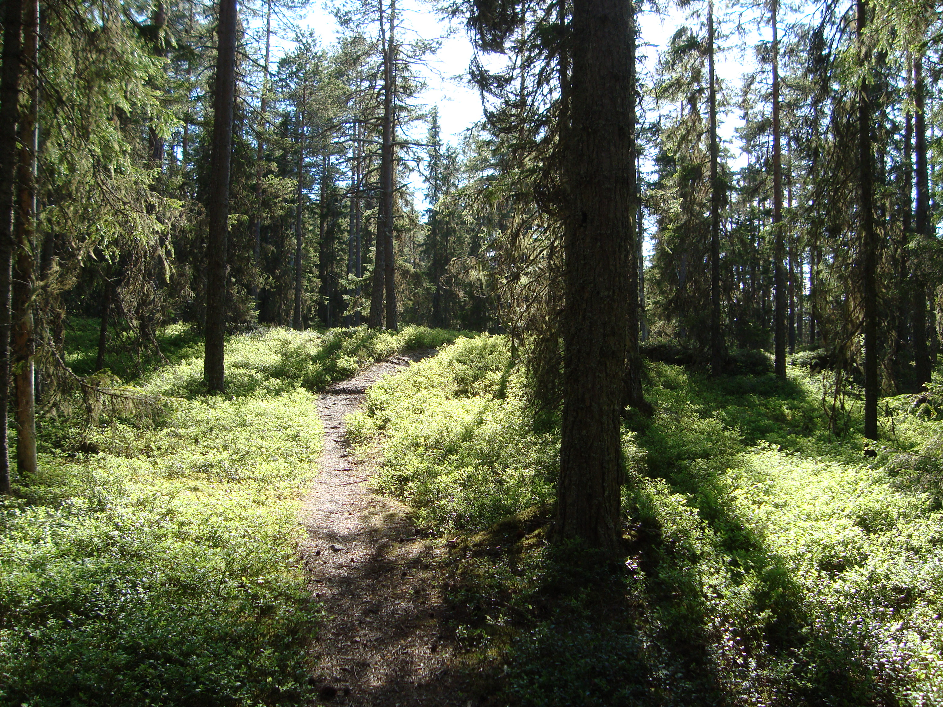 En fin skogspromenad på Hässningberget med solen skinandes bakom (ovanför) träden.